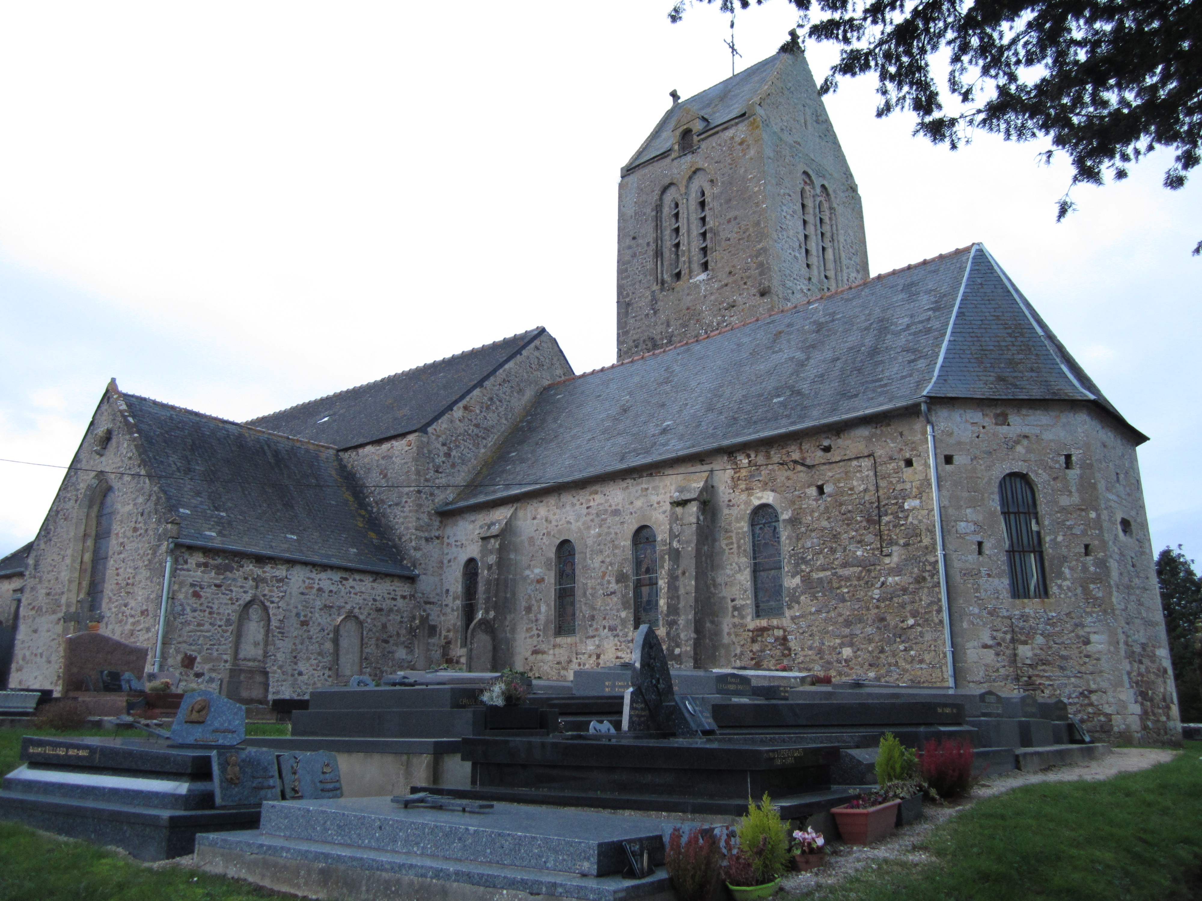 Église Saint-Martin de Lestre